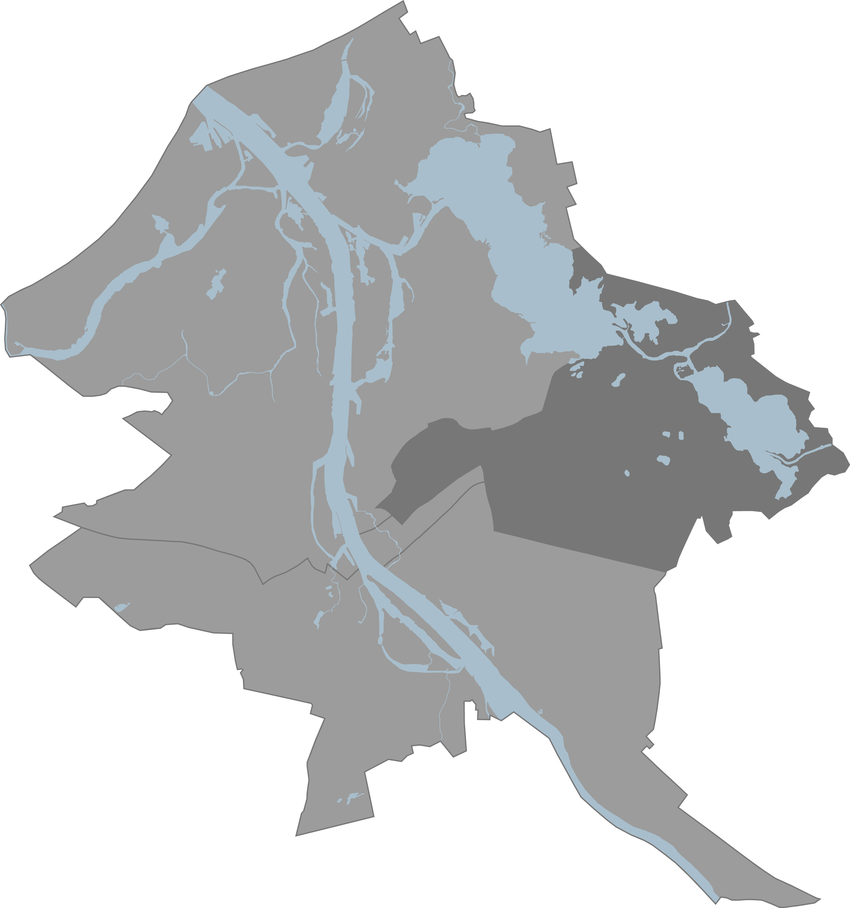 Riga Vidzemes priekspilseta karte